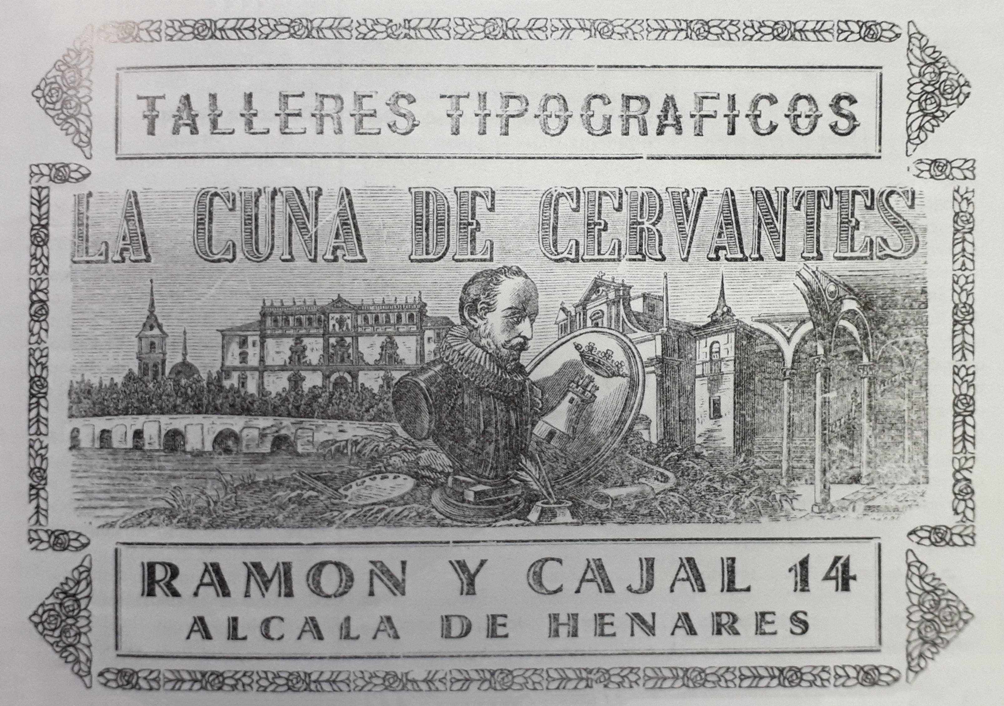 Anuncio publicitario de los Talleres tipográficos "La Cuna de Cervantes", publicado en el Boletín de la Mutual Obrera Complutense hacia 1924. Imprenta situada en la calle Ramón y Cajal, 14; en Alcalá de Henares (Comunidad de Madrid - España). El grabado es de Carbonell y representa de izquierda a derecha: la torre de la Catedral-Magistral, la fachada de la Universidad de Alcalá, el puente Zulema sobre el río Henares, un busto de Miguel de Cervantes (debajo aparecen una paleta de pintor y un tintero con dos plumas), el escudo de Alcalá de Henares, la fachada de la Iglesia de los Jesuitas y una torre del Colegio del Rey, y la escalera de Covarrubias del Palacio Arzobispal.